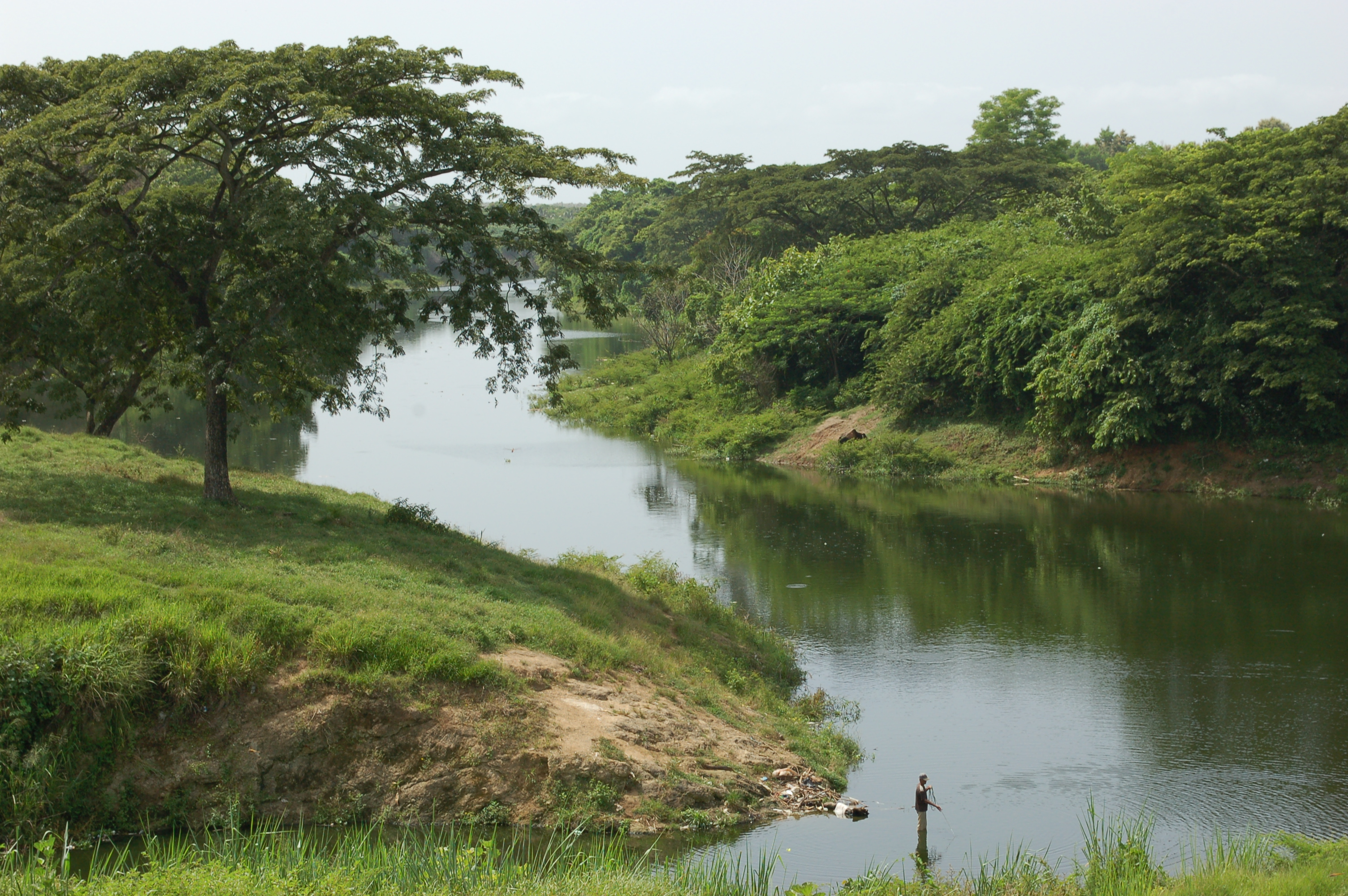 Rio Yayabo en la provincia de Sancti Spiritus. Cuba